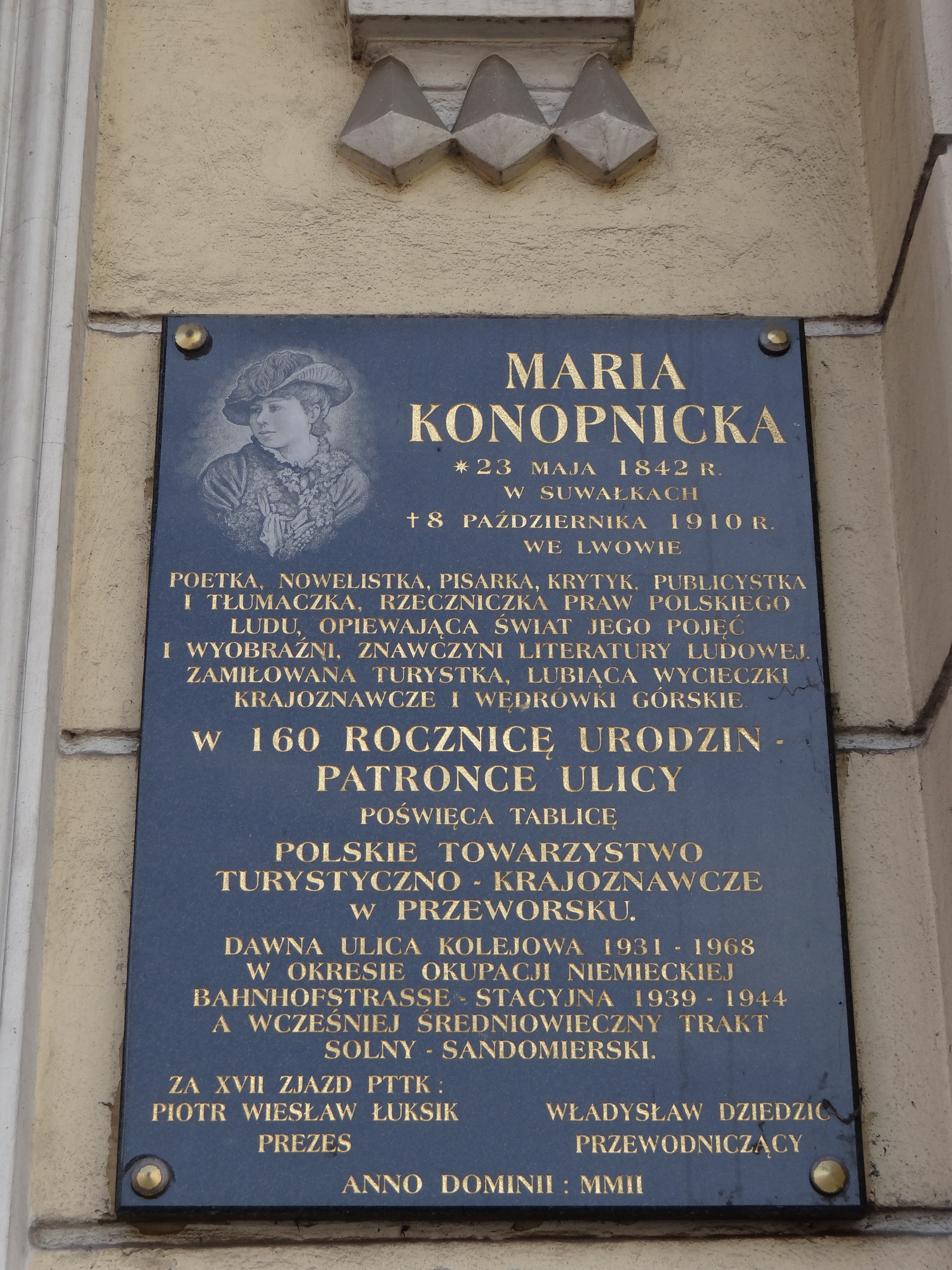 Przeworsk, dom, 1928